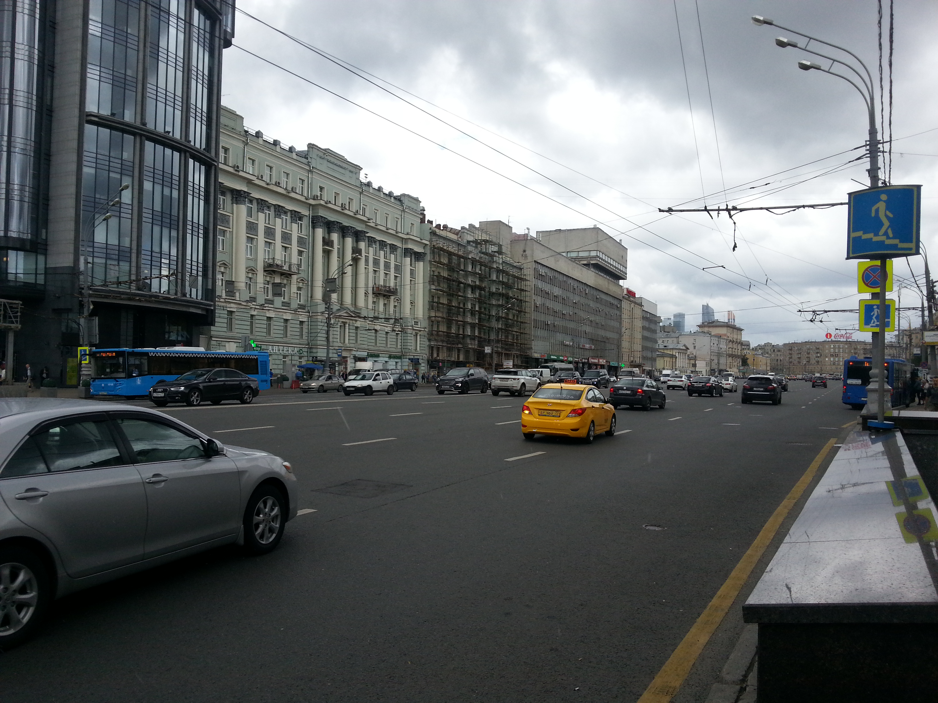 Зубовский бульвар, д.17/1. 8 июля 2016г.